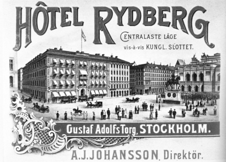 Hotel Rydberg